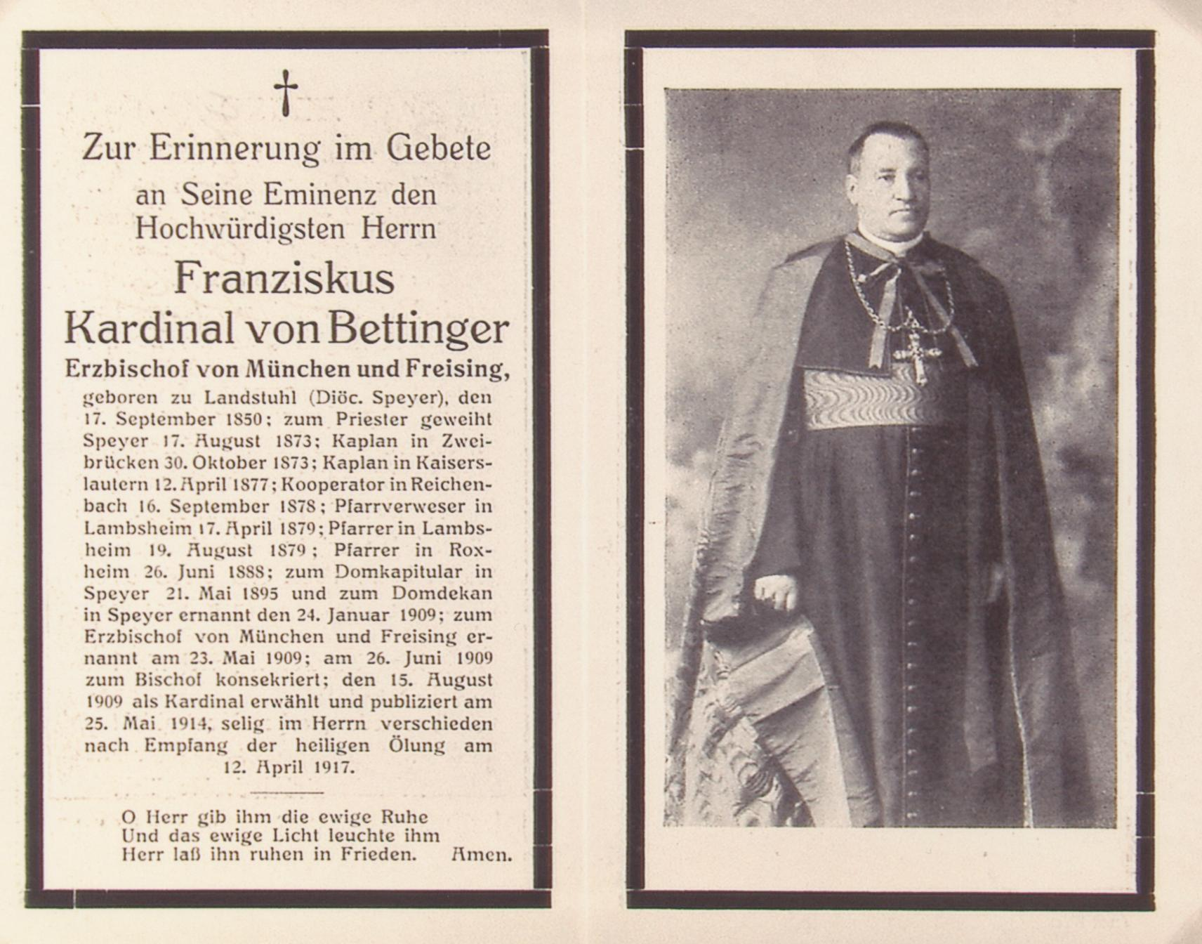 Kardinal Franz Bettinger München, Sterbebildchen 1917